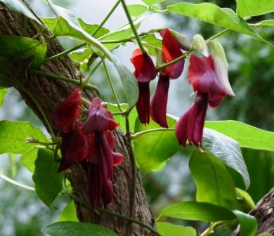 Kennedia rubicunda im Botanischen Garten Leipzig